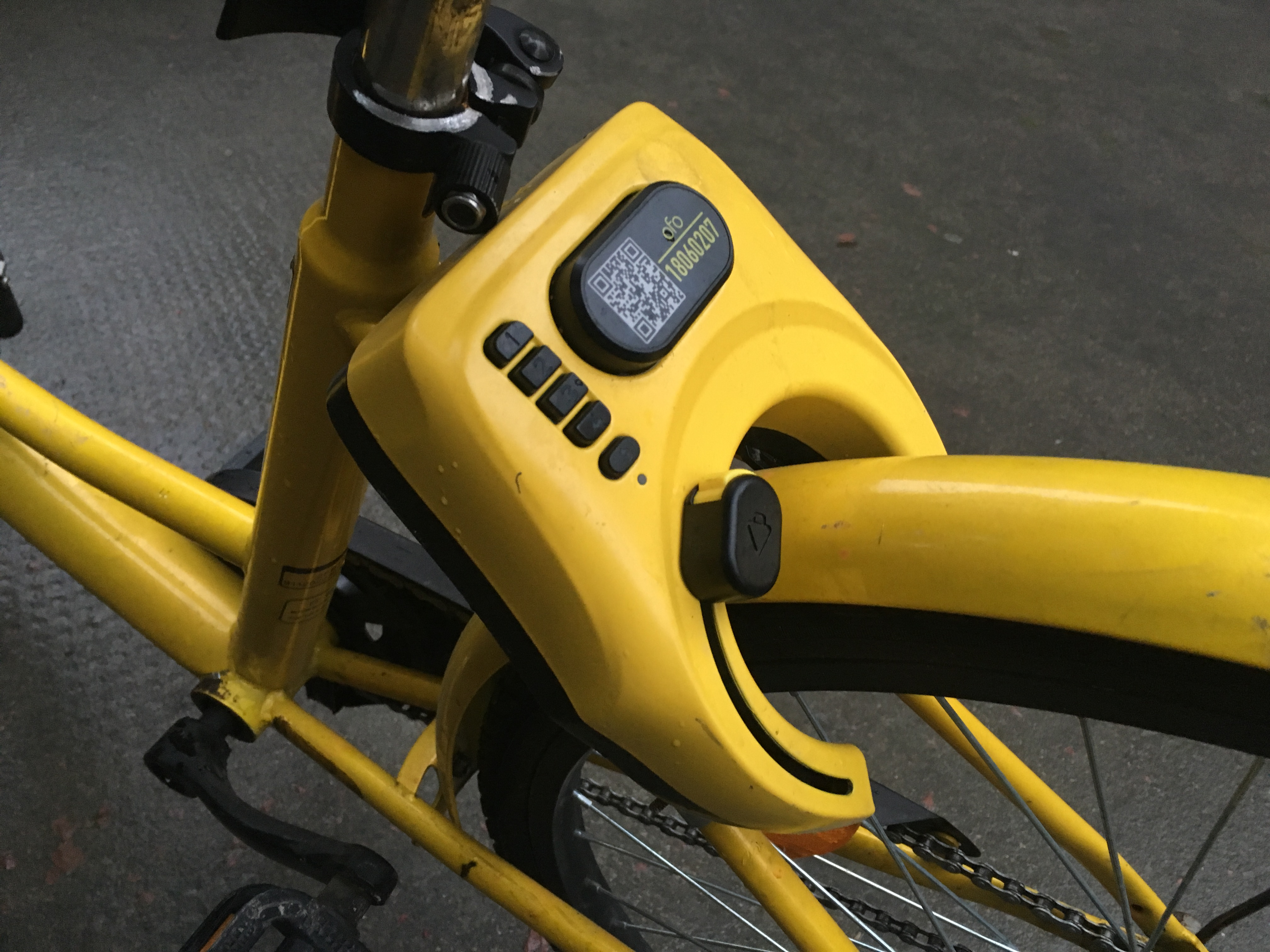 ofo的电子蓝牙密码锁，在手机开启蓝牙时可免输入密码，自动开锁